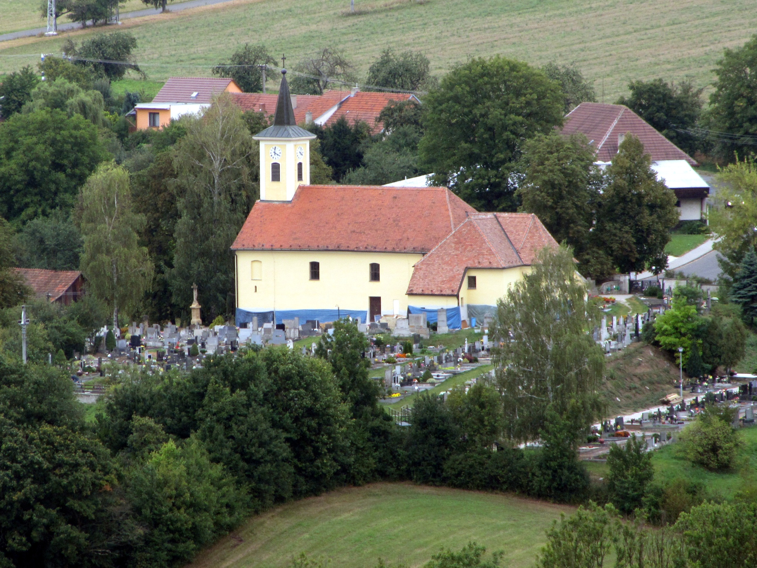 Kostel sv. Petra a Pavla v Nezdenicích, okres Uherské Hradiště